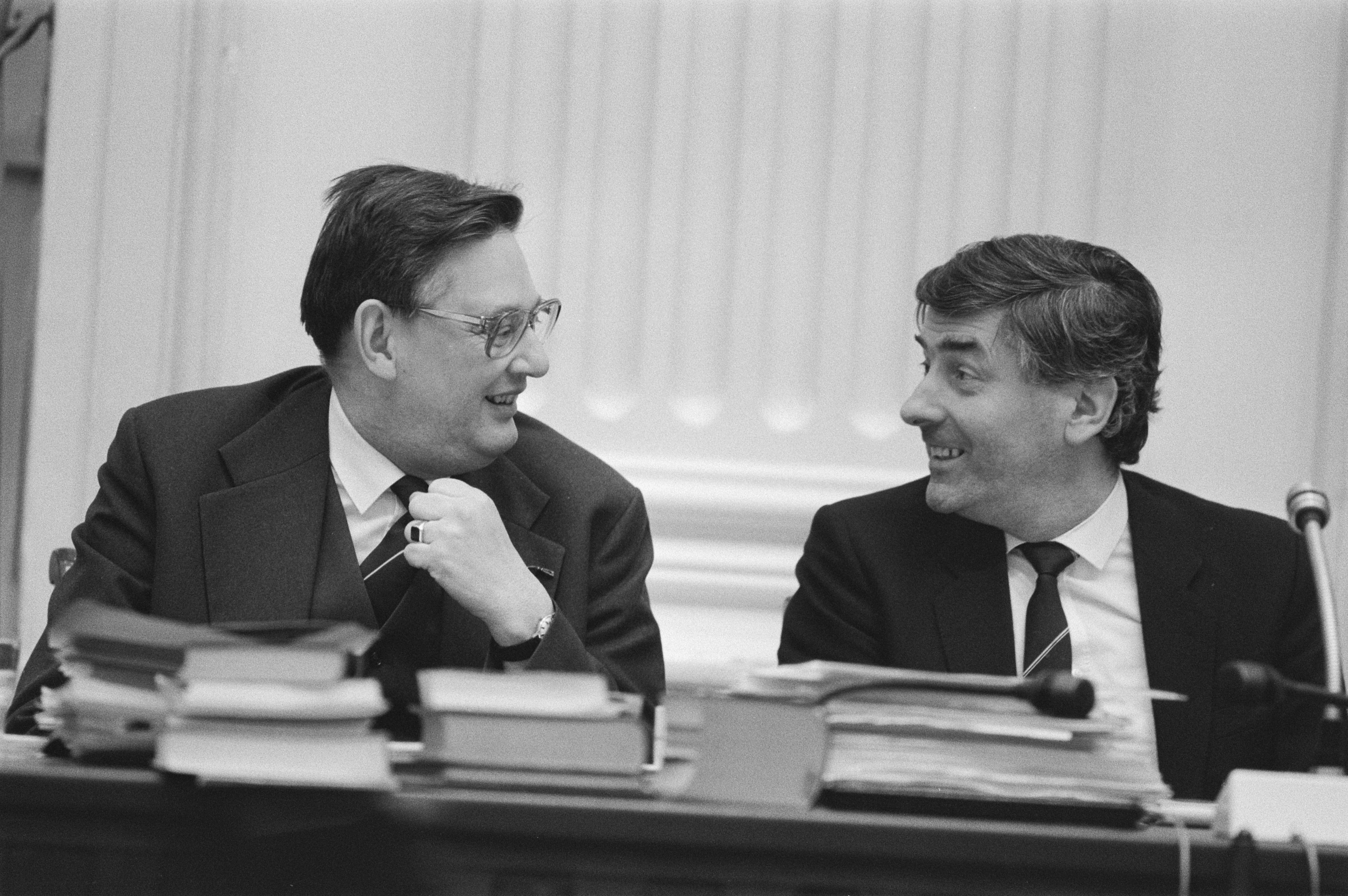 Collectie / Archief : Fotocollectie Anefo Reportage / Serie : [ onbekend ] Beschrijving : Tweede Kamer , RSV debat, minister Van Aardenne (l) en premier Lubbers Datum : 6 maart 1985 Trefwoorden : Debatten Persoonsnaam : Aardenne, Gijs van, Lubbers, Ruud Fotograaf : Bogaerts, Rob / Anefo Auteursrechthebbende : Nationaal Archief Materiaalsoort : Negatief (zwart/wit) Nummer archiefinventaris : bekijk toegang 2.24.01.05 Bestanddeelnummer : 933-2576